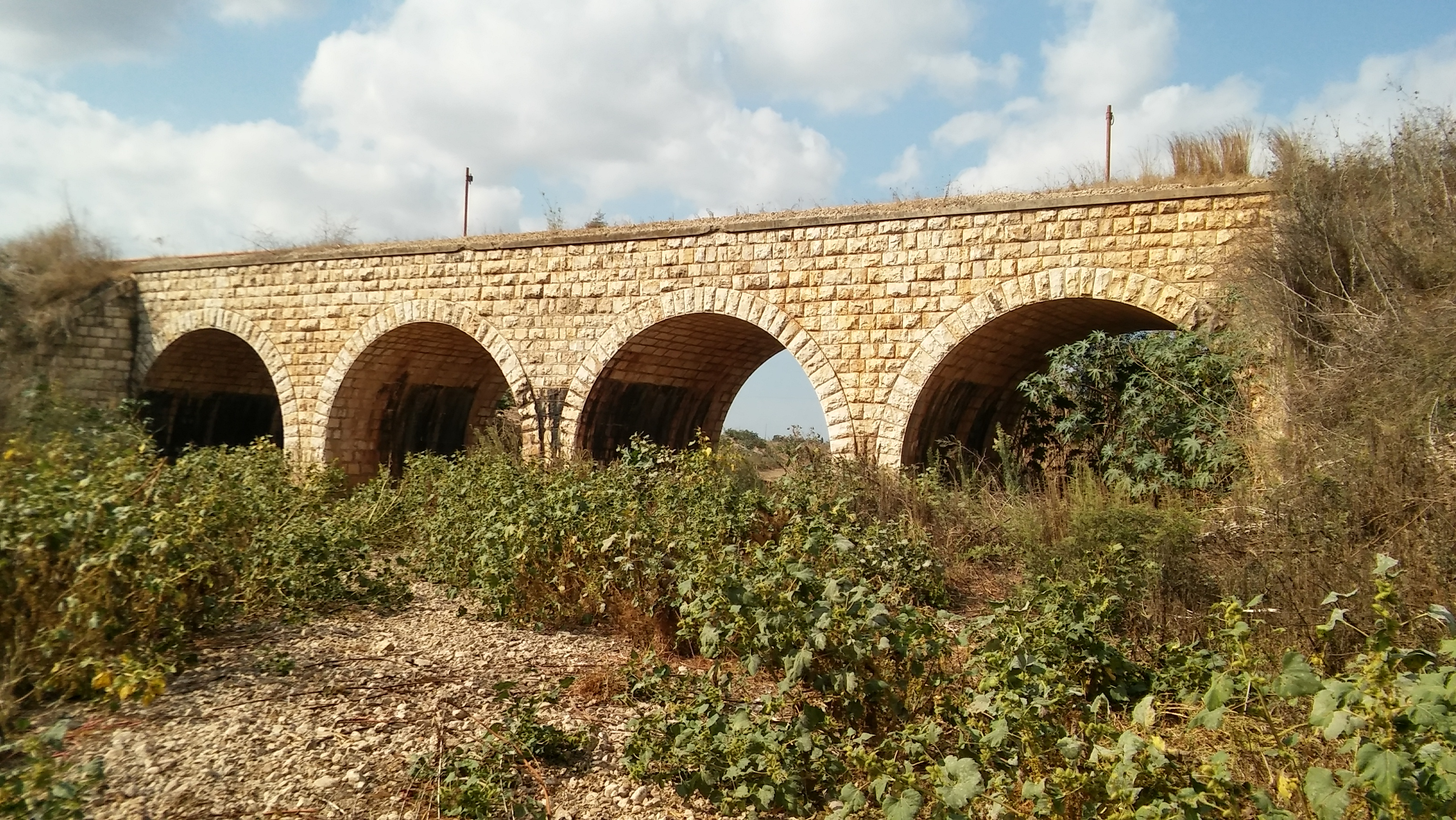 המסילה המזרחית - גשר על נחל קנה לייד אלישמע